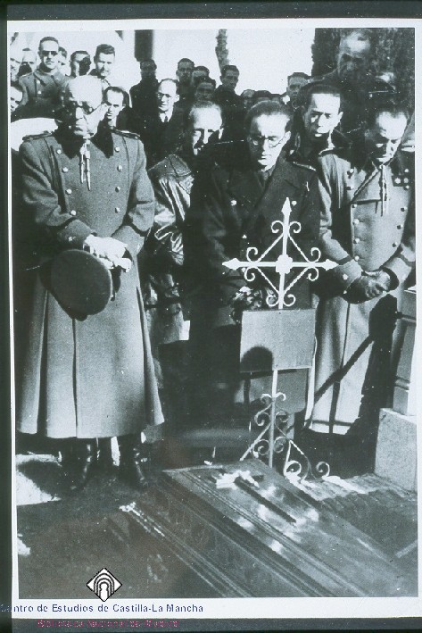 El general Moscardó junto a su esposa, en el entierro de su hijo Luis, fusilado por no rendir su padre el Alcázar.